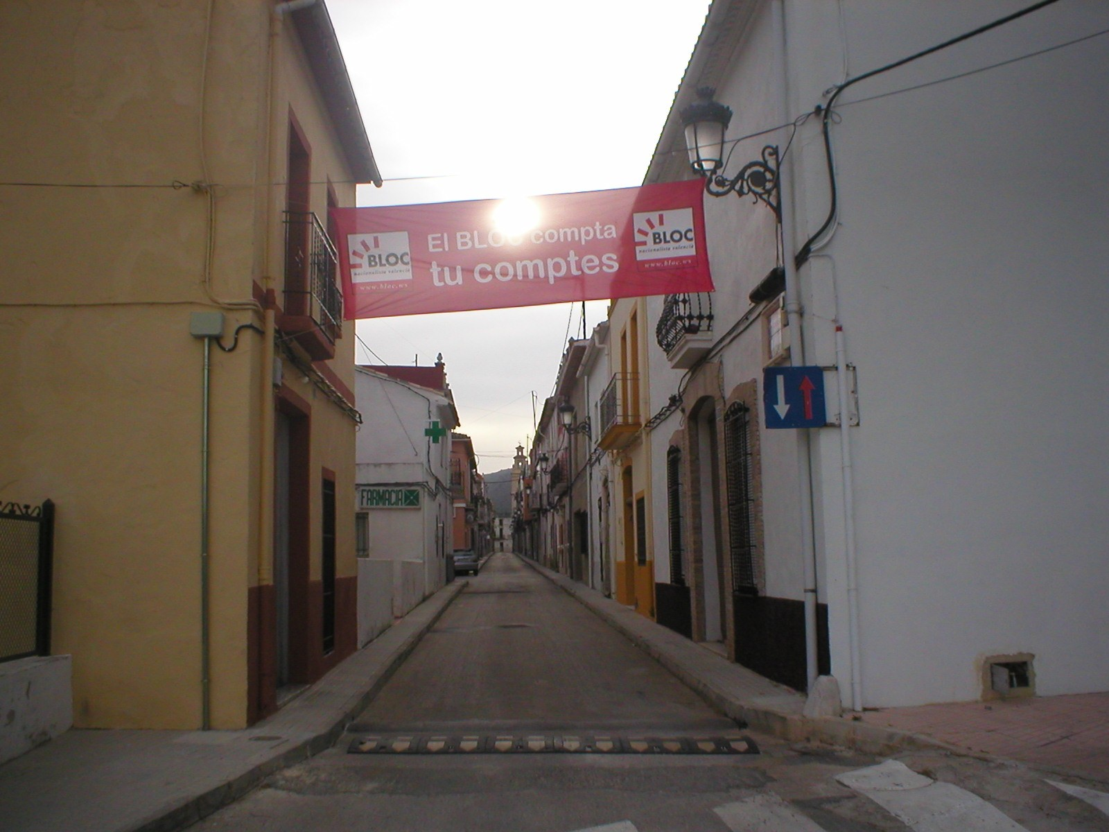 Inici de la campanya electoral a Benigembla. Un cartell del Bloc.